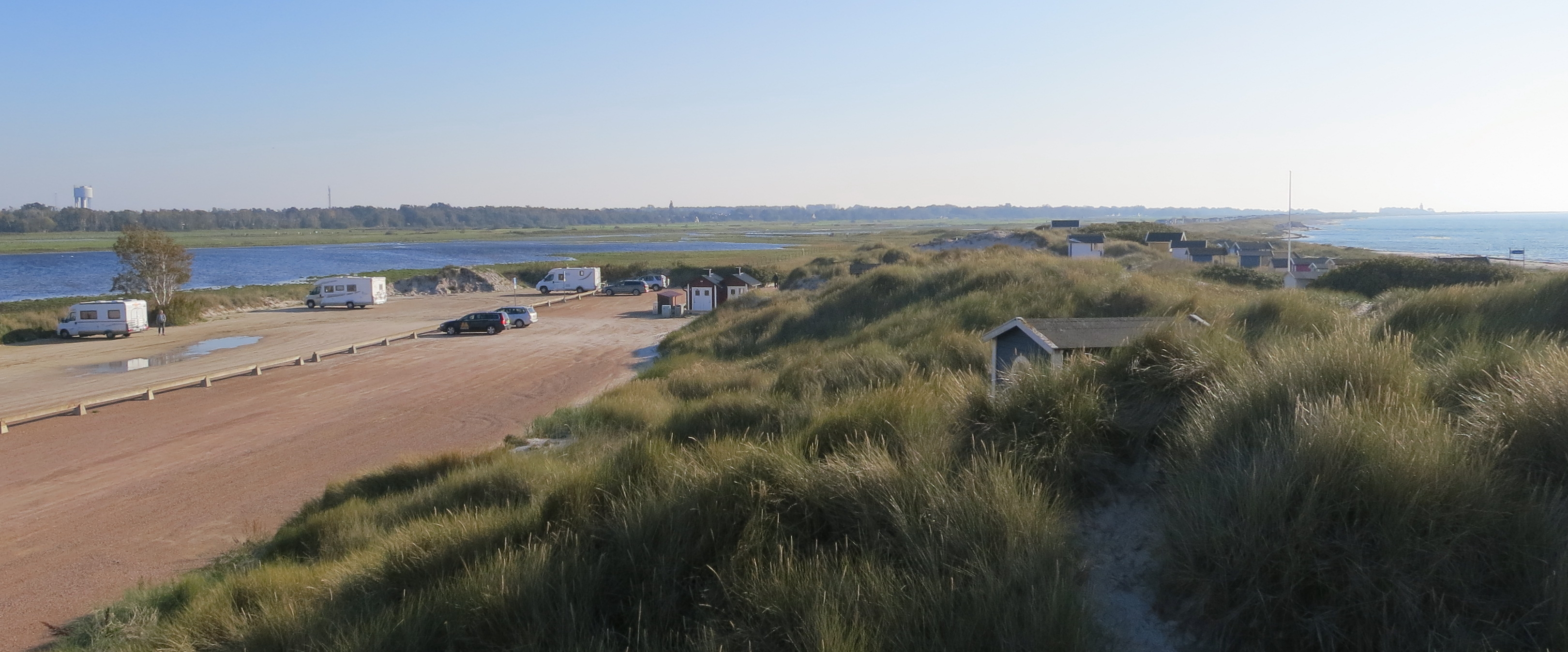 Flommen, Skanör